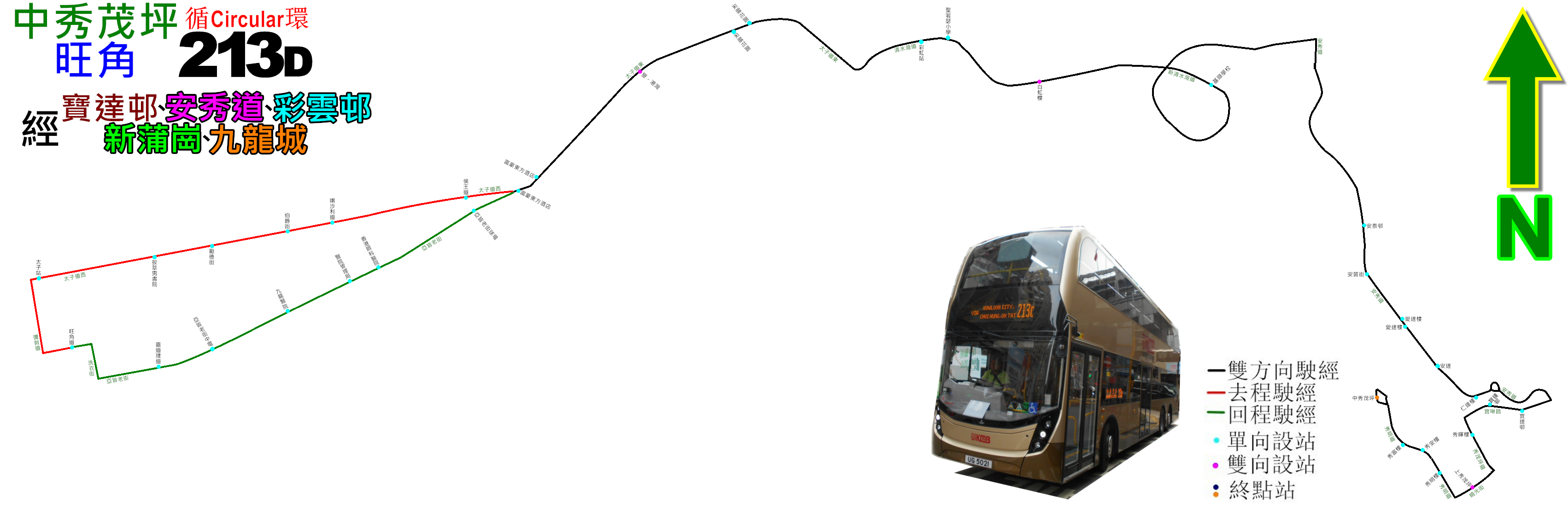 中文（香港）: 九龍巴士213D線的走線圖